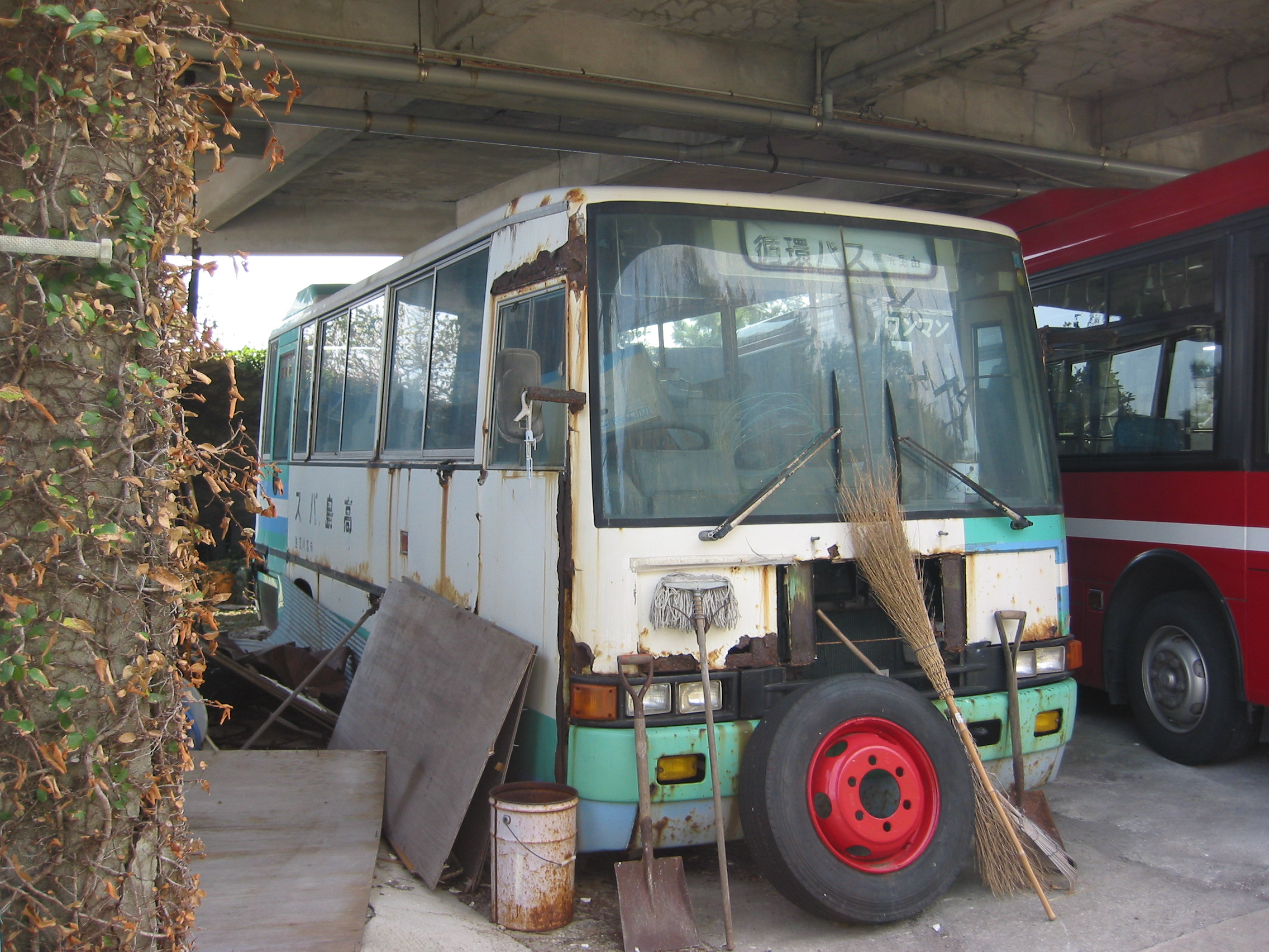 富川運送 かつて路線バスで使用されていた車両（廃車）